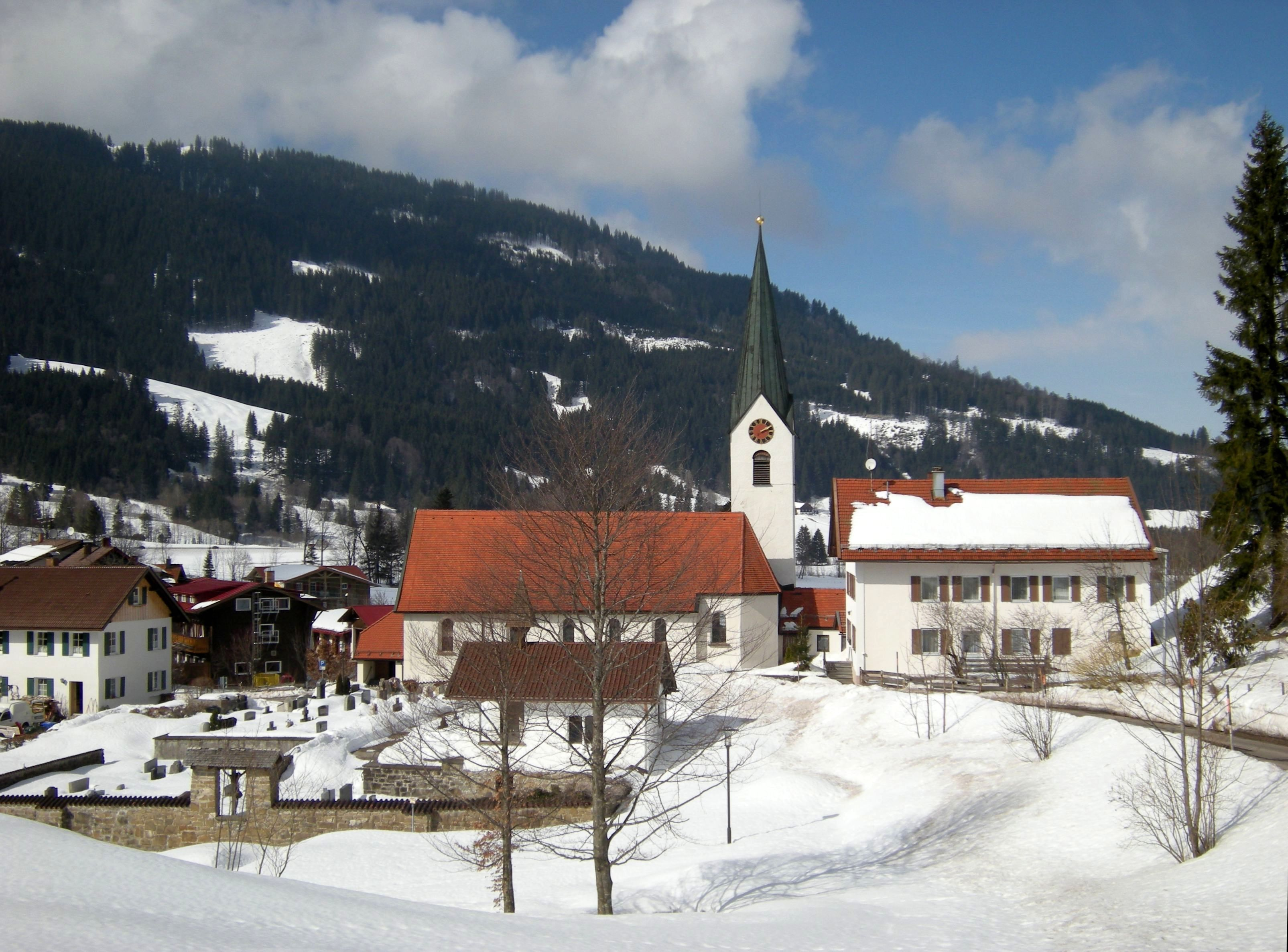 Unterjoch im Winter